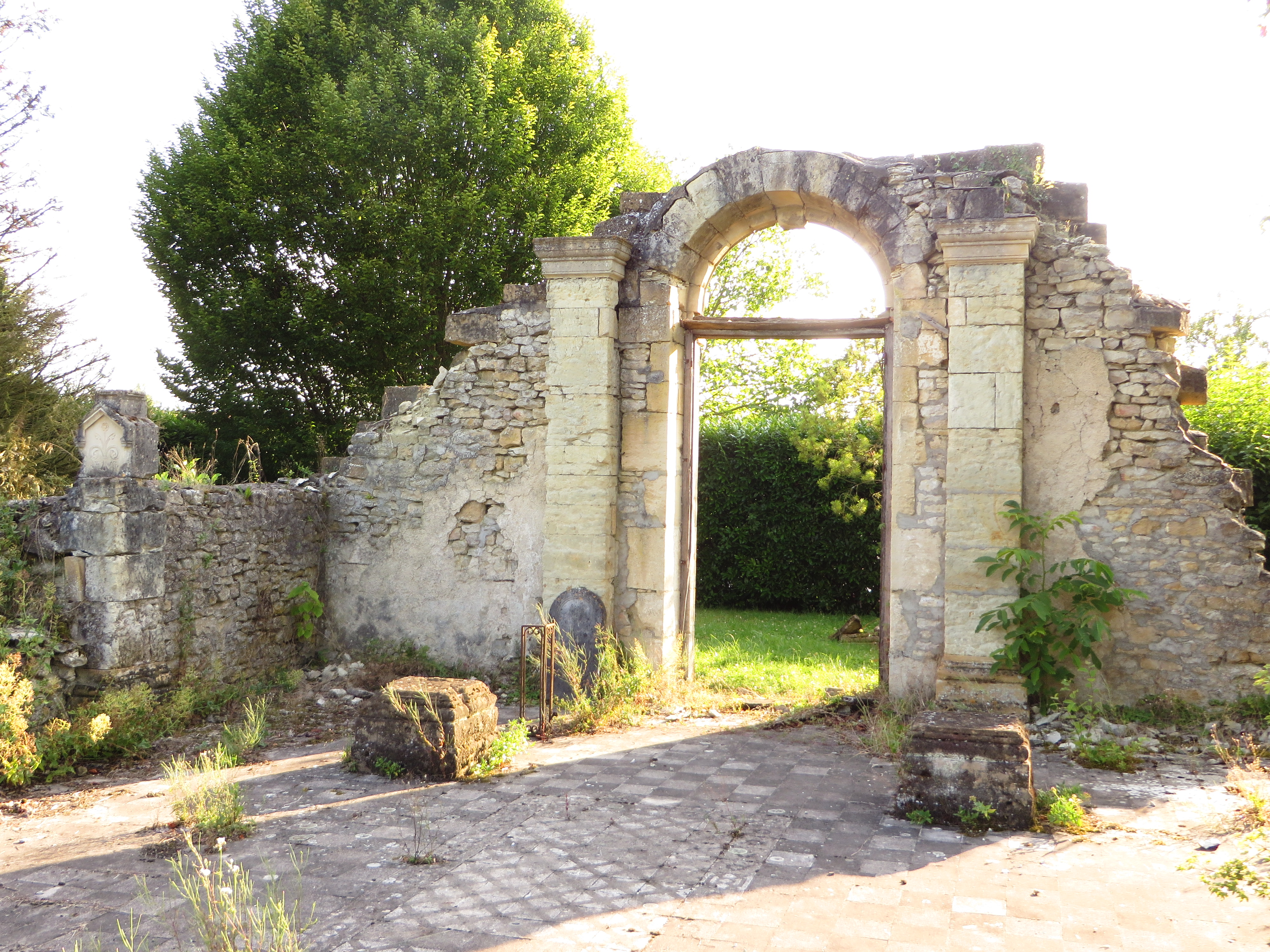 Épinonville Vestiges de l'église Saint-Nicolas d'Ivoiry